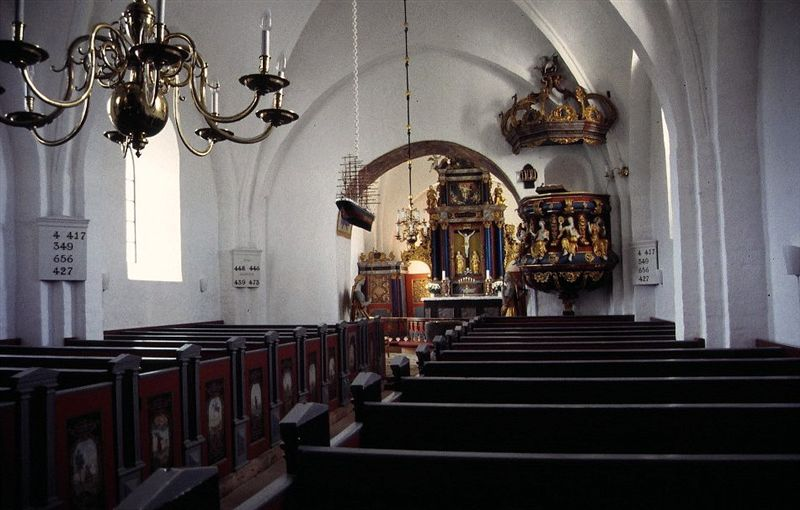 Engum Kirke i Danmark. Skibet set mod øst